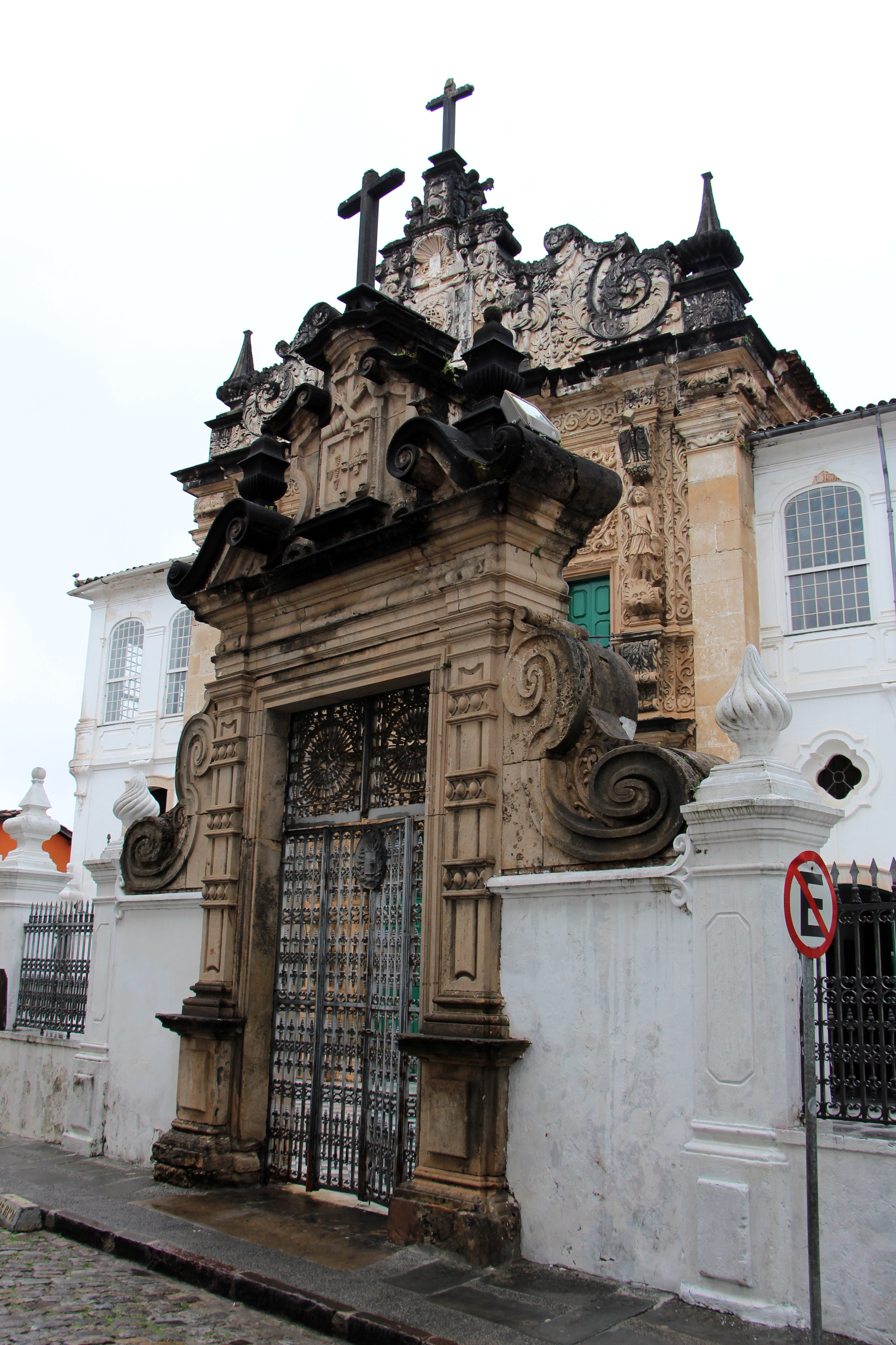 Igreja da Ordem Terceira de São Francisco (Salvador)